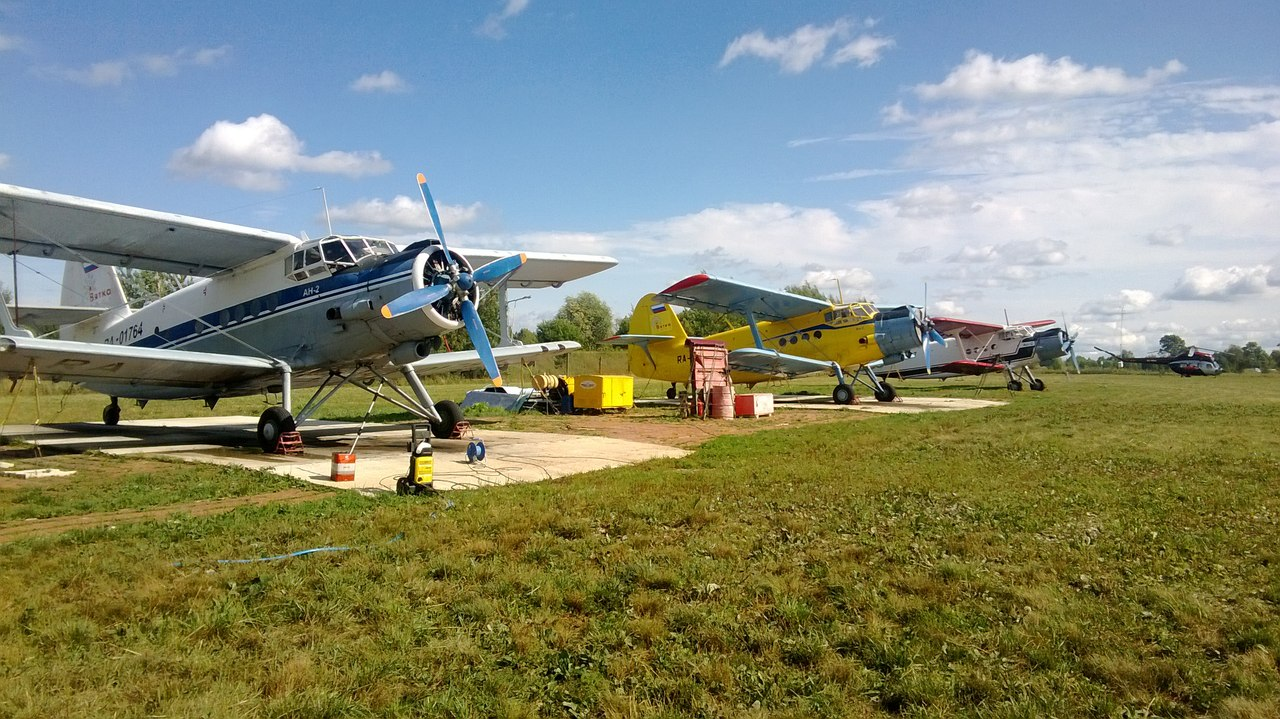 Стоянки воздушных судов на ПП "Кучаны"